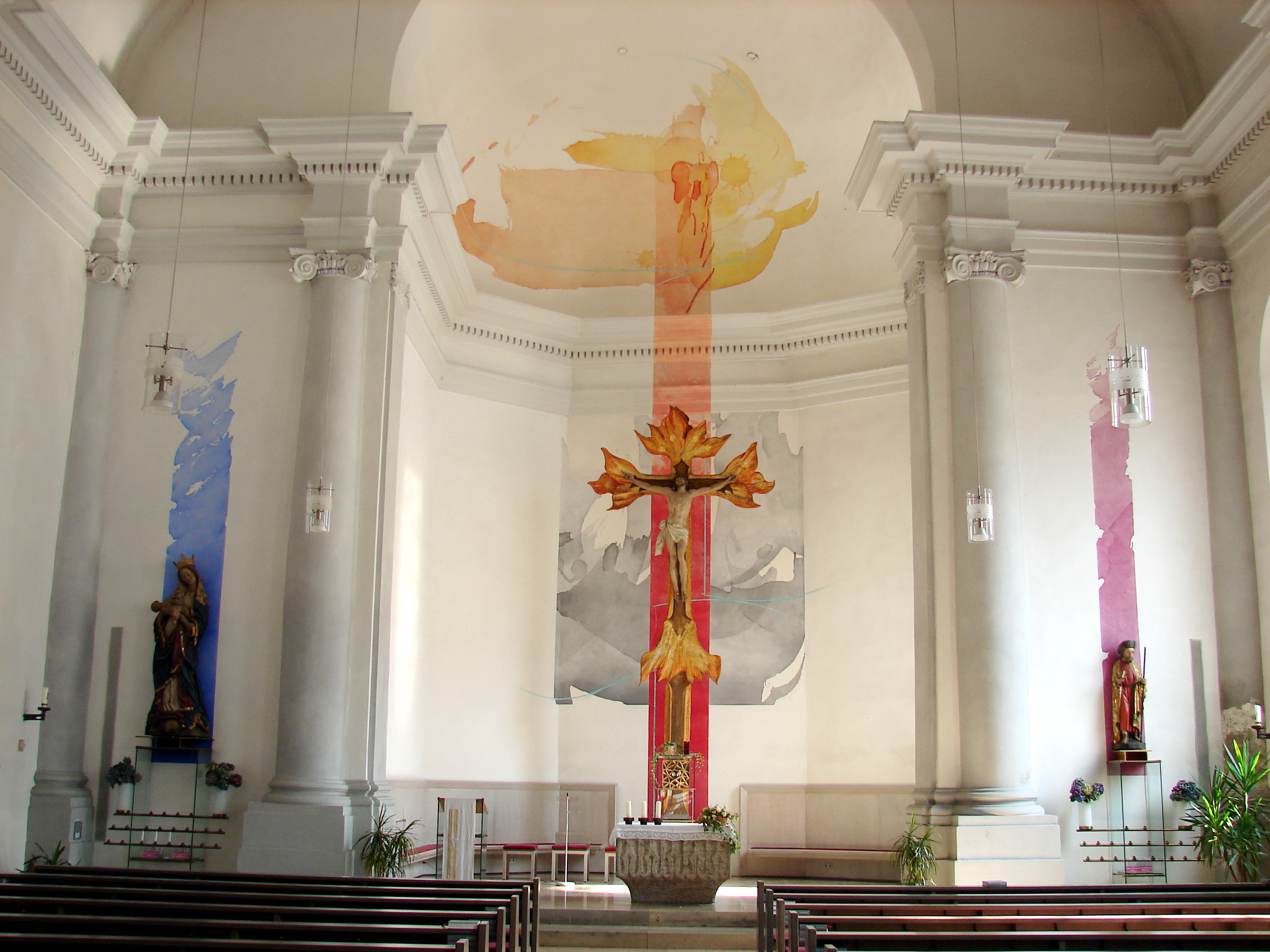 Die Pfarrkirche St. Gertraud steht im Passauer Stadtteil Innstadt.